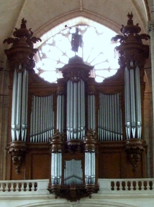 Cathédrale Saint-Pierre de Poitiers, Poitiers, Vienne, Poitou-Charentes, FRANCE